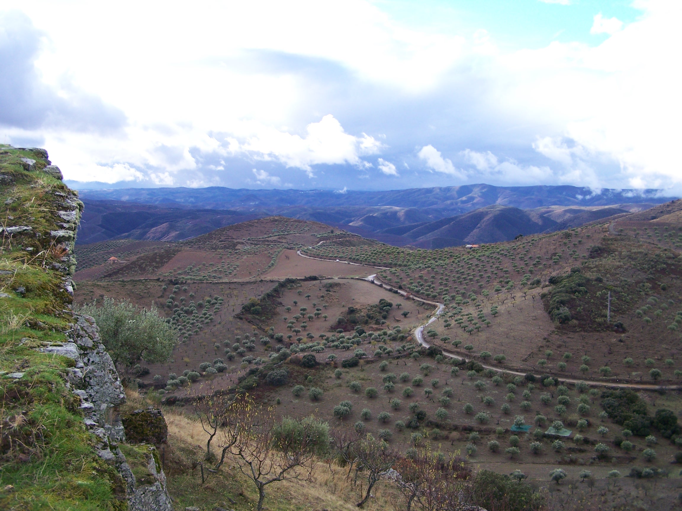 Vista do Castelo de Castelo Melhor.